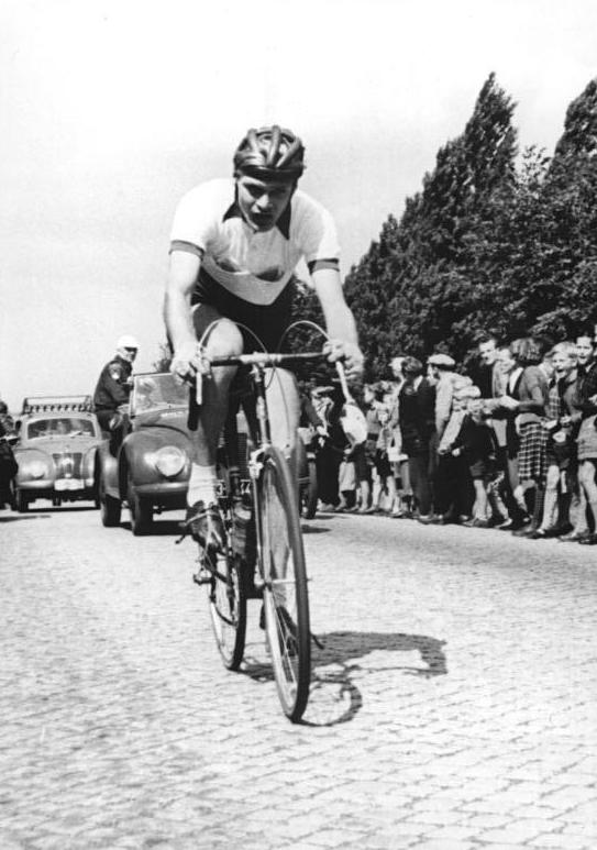 Wolfgang Braune Zentralbild Schlegel 13.8.1956 Schur gewann den "Großen Diamantpreis" Bei dem zum 10ten male ausgetragenen Strassenrennen um den "Großen Diamantpreis" am 12.8.1956 in Karl-Marx-Stadt siegt der Verdiente Meister des Sports Gustav-Adolf Schur vor seinem Clubkameraden Roland Henning. UBz: Wolfgang Braune belegte bei diesem Rennen den 4. Platz.